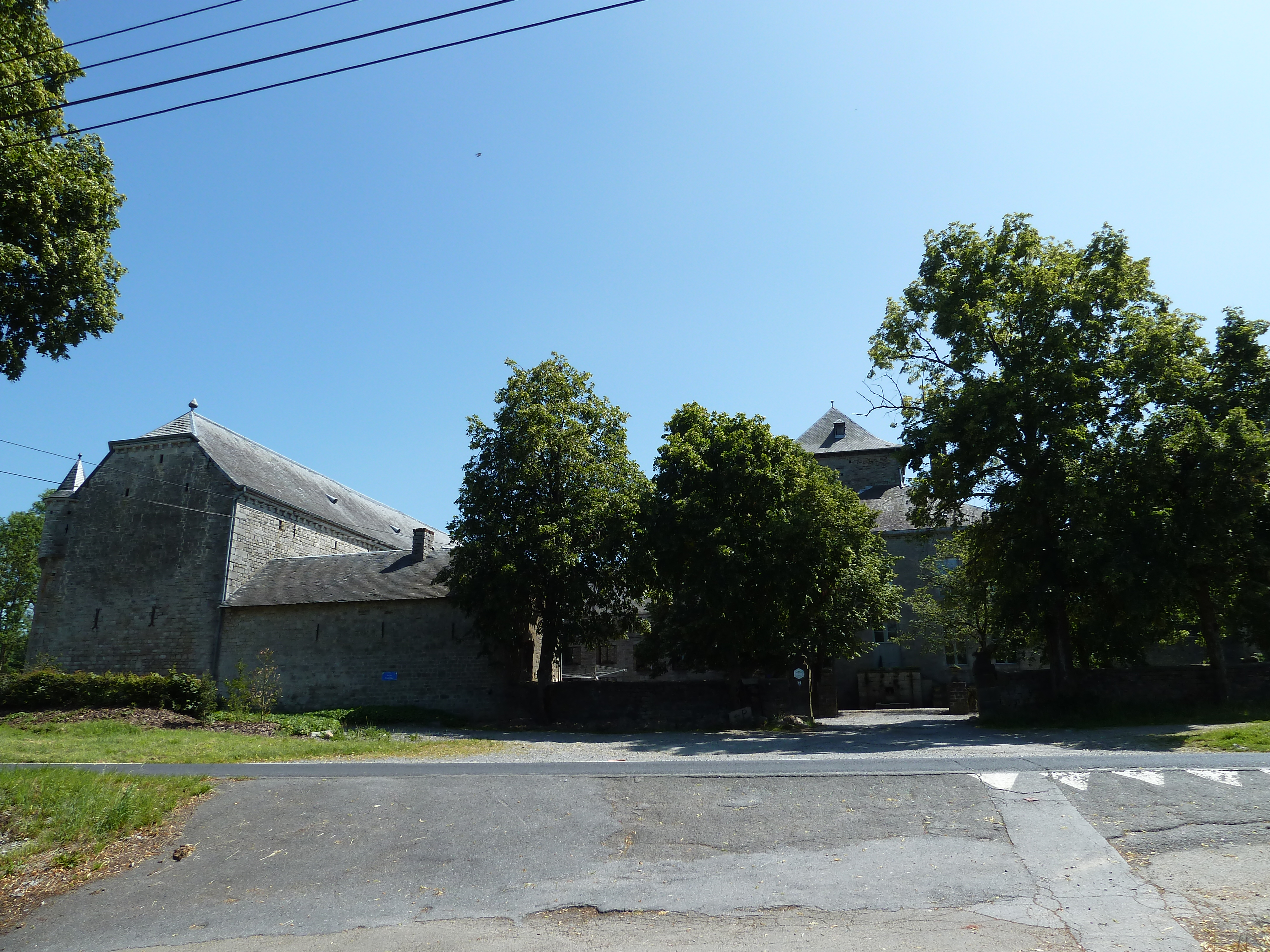 Château-ferme de Fisenne, Érezée, Belgique